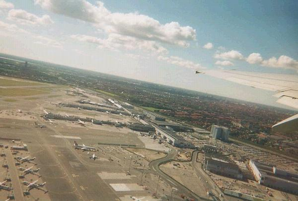 Kastrups flygplats. Bilden tagen juli 2003 från en grön Sterling Boeing 737. "Bilden tagen av mig själv 2003 från en Sterling Boeing 737 strax efter starten" från Användare:Supernissen